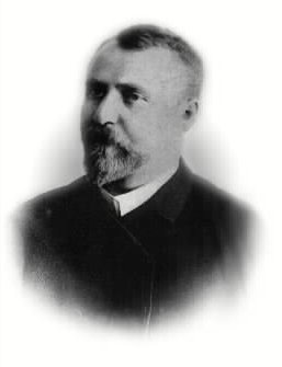 Христо Белчев - български политик от Народнолибералната партия и поет